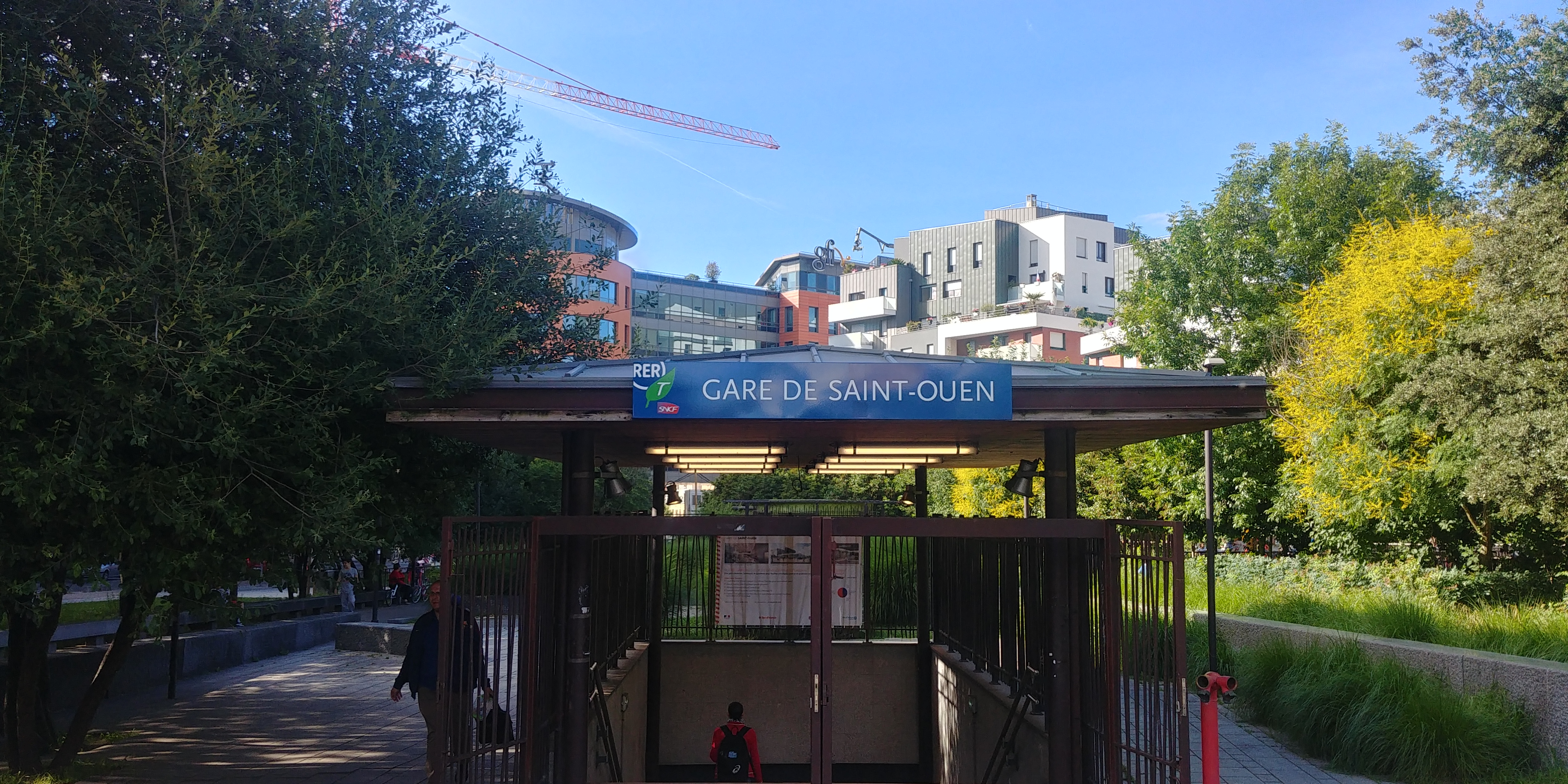 Entrée sud de la gare de Saint-Ouen